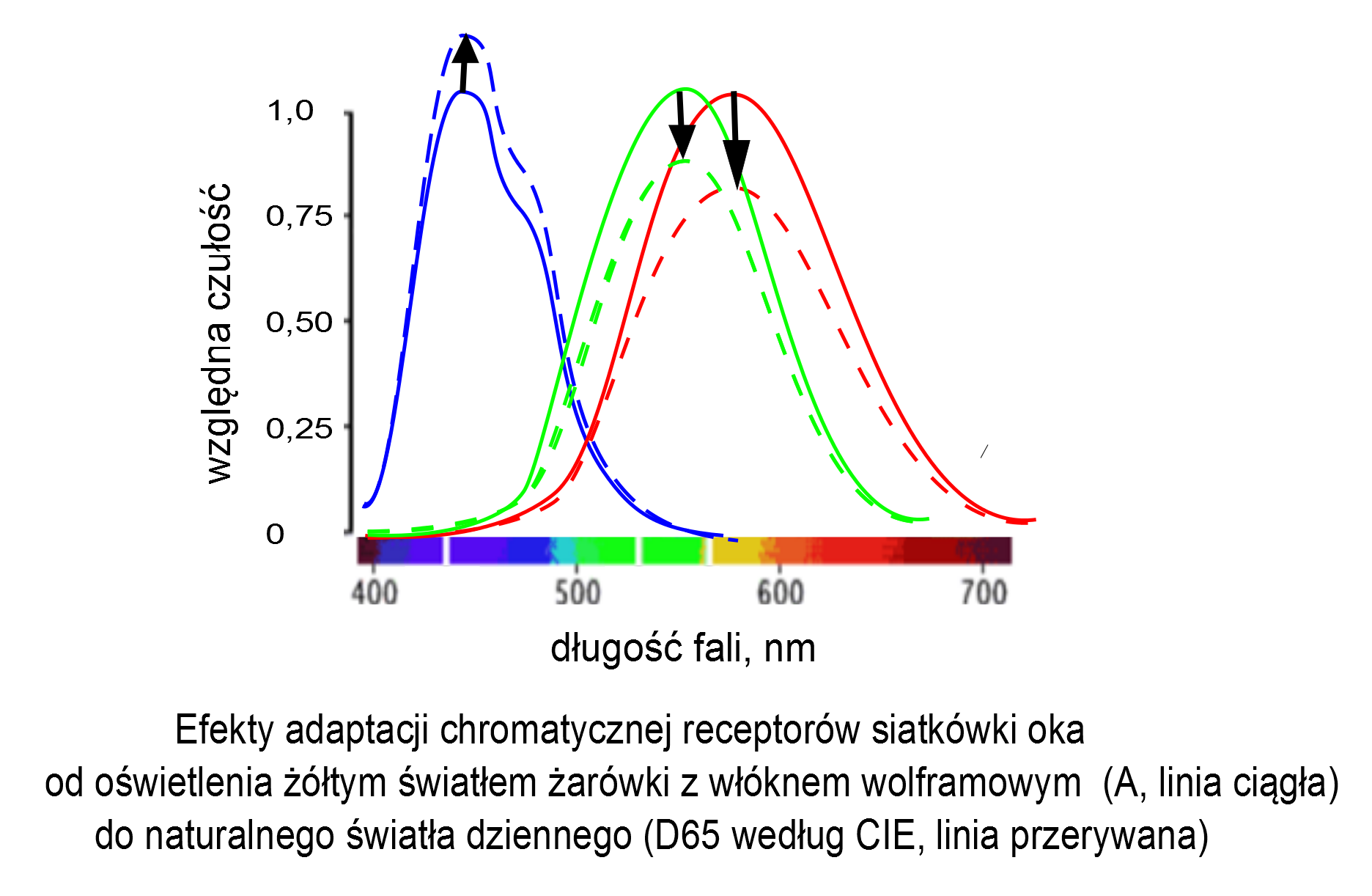 Przykład ilustrujący zasadę zjawiska stałości barw (JJohannes von Kries, 1902)